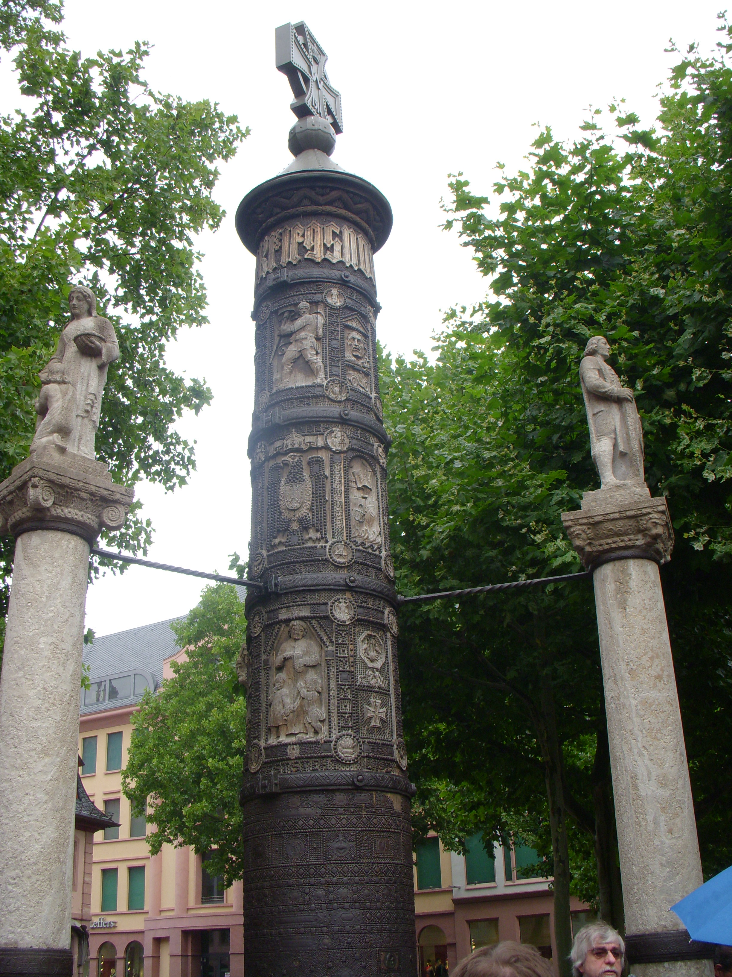 Nagelsäule Mainz Liebfrauenplatz